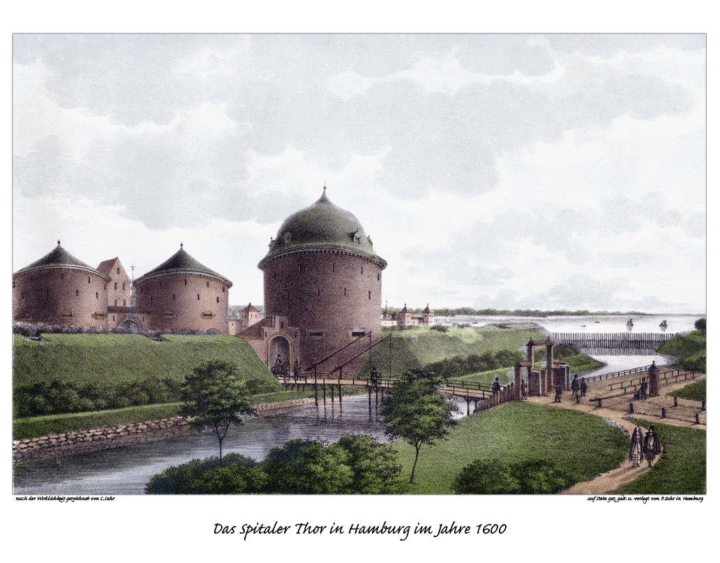 Hamburg,1600, Spitaler Thor.